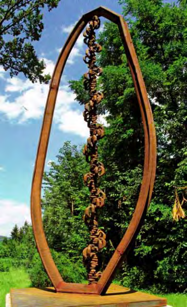 Mandordla BARBARa, Rolf Laven, 2016, Stahl, Artmining Voitsberg